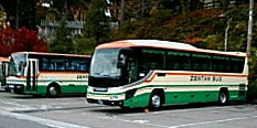 bus 001.jpg